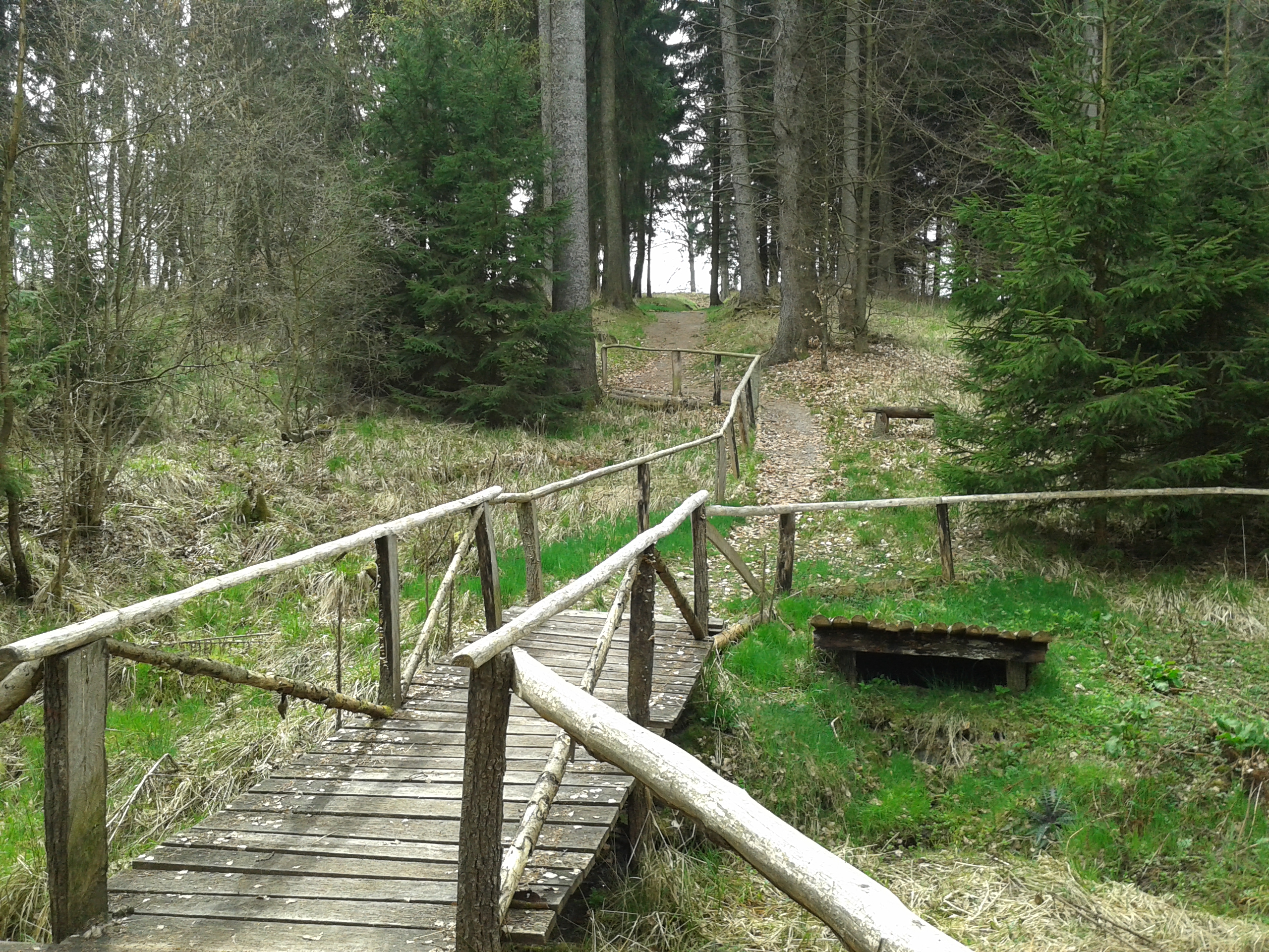 Brücke am Franzosenbrunnen